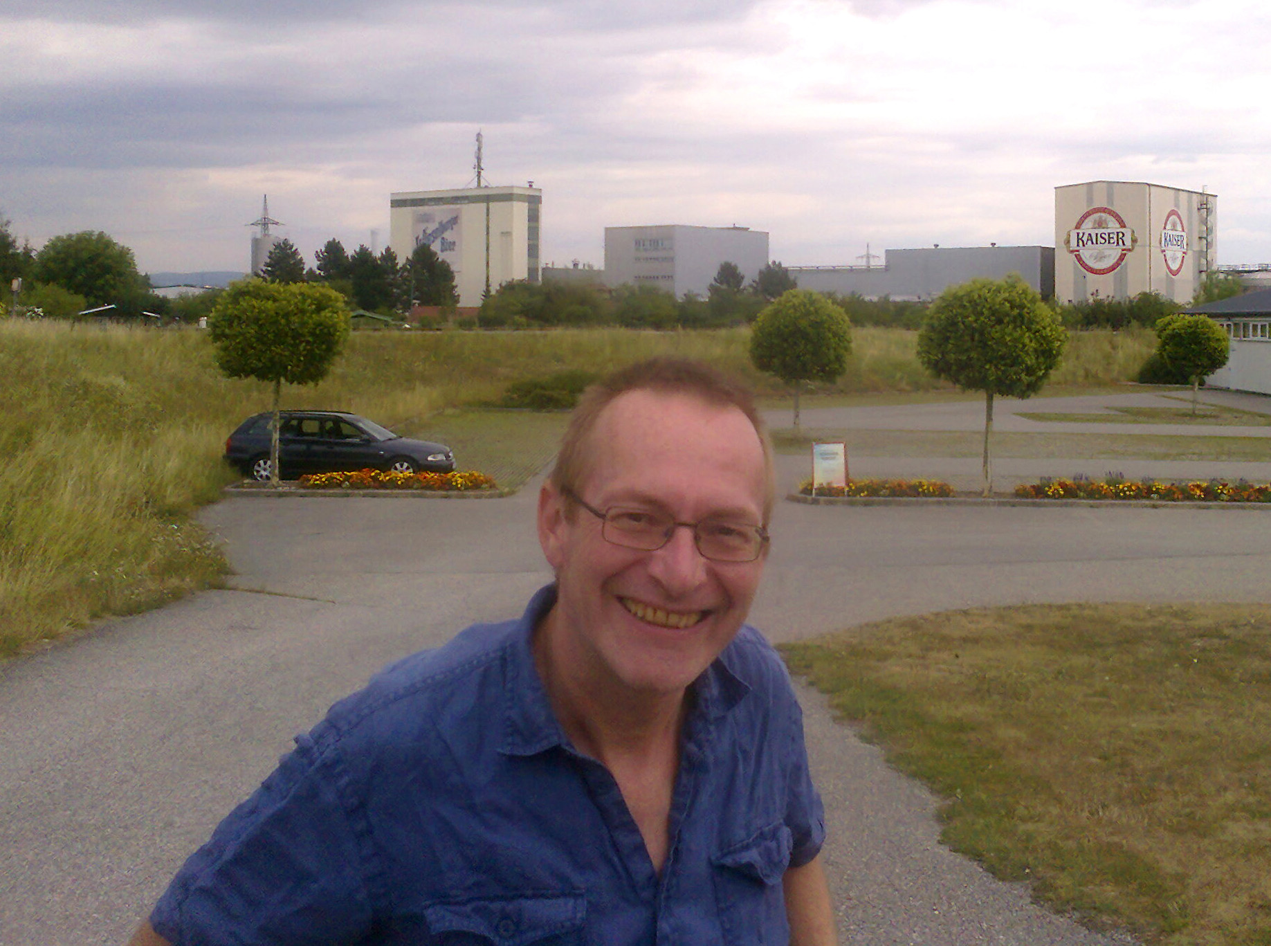 Tom Fatz bei der Besichtigung einer Brauerei in Wieselburg im Jahr 2017.